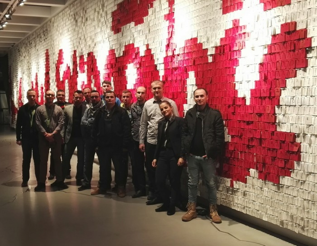 Zdjęcie Sekcji Młodych podczas zwiedzania "ECS"